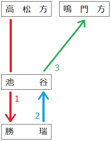 四国旅客鉄道（JR四国）池谷駅、勝瑞駅間の運賃を表した図。